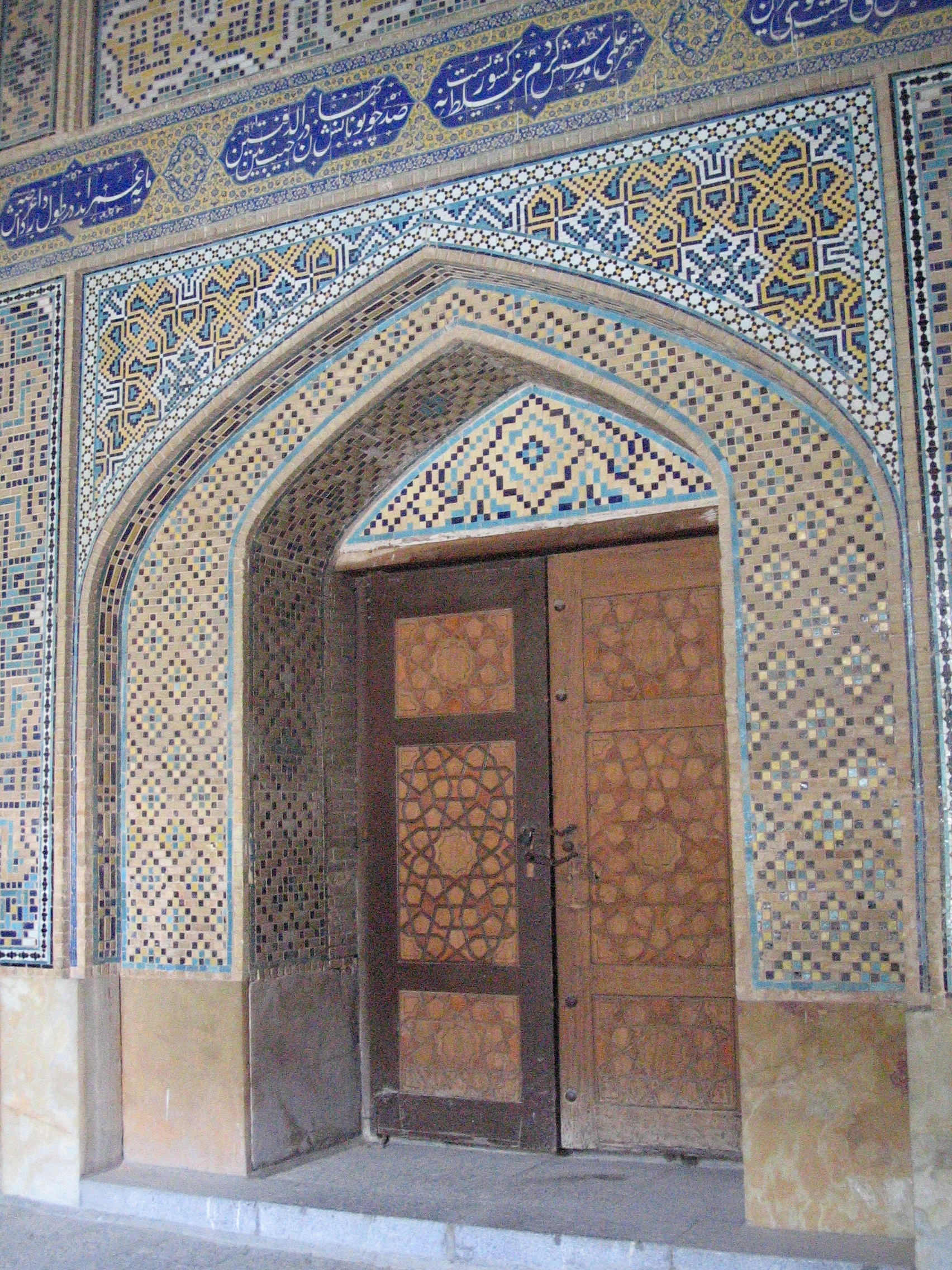 A door inside madreseh-e-chahar bagh in Esfahan (Isfahan).